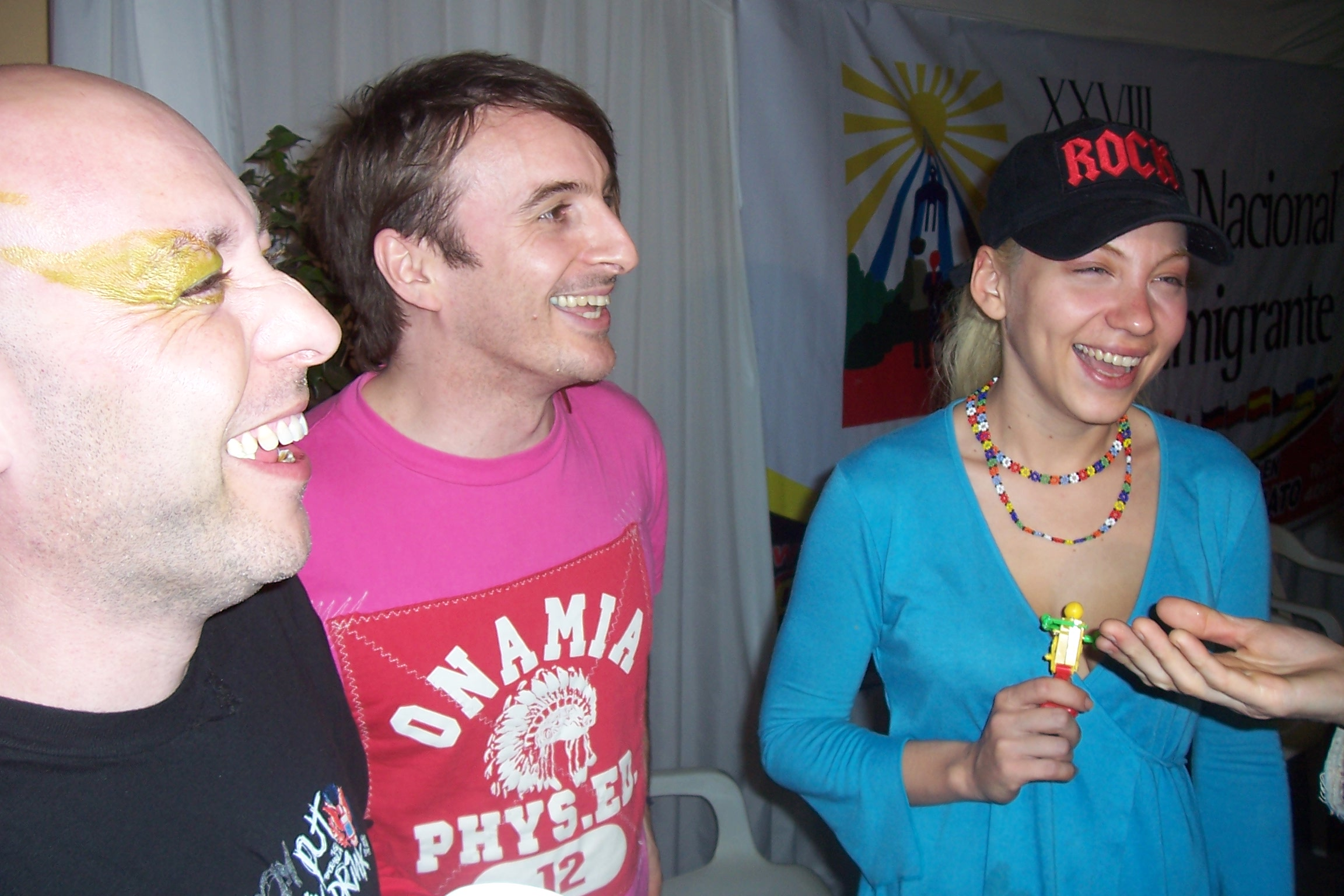 La banda argentina Lourdes en la conferencia de prensa realizada en la Fiesta Nacional del Inmigante, de Oberá, Misiones.